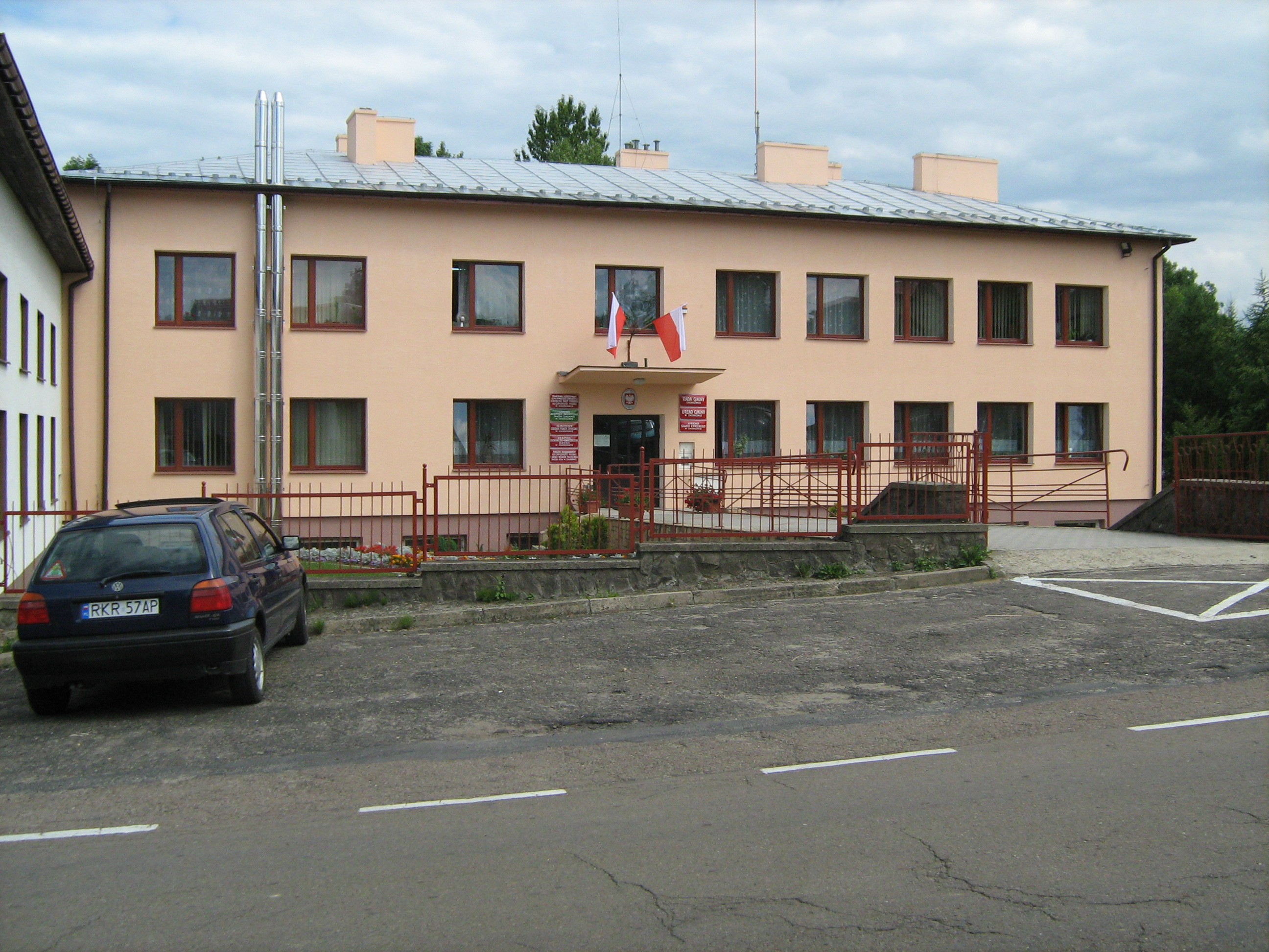 Urząd Gminy Chorkówka (pow. krosnieński)